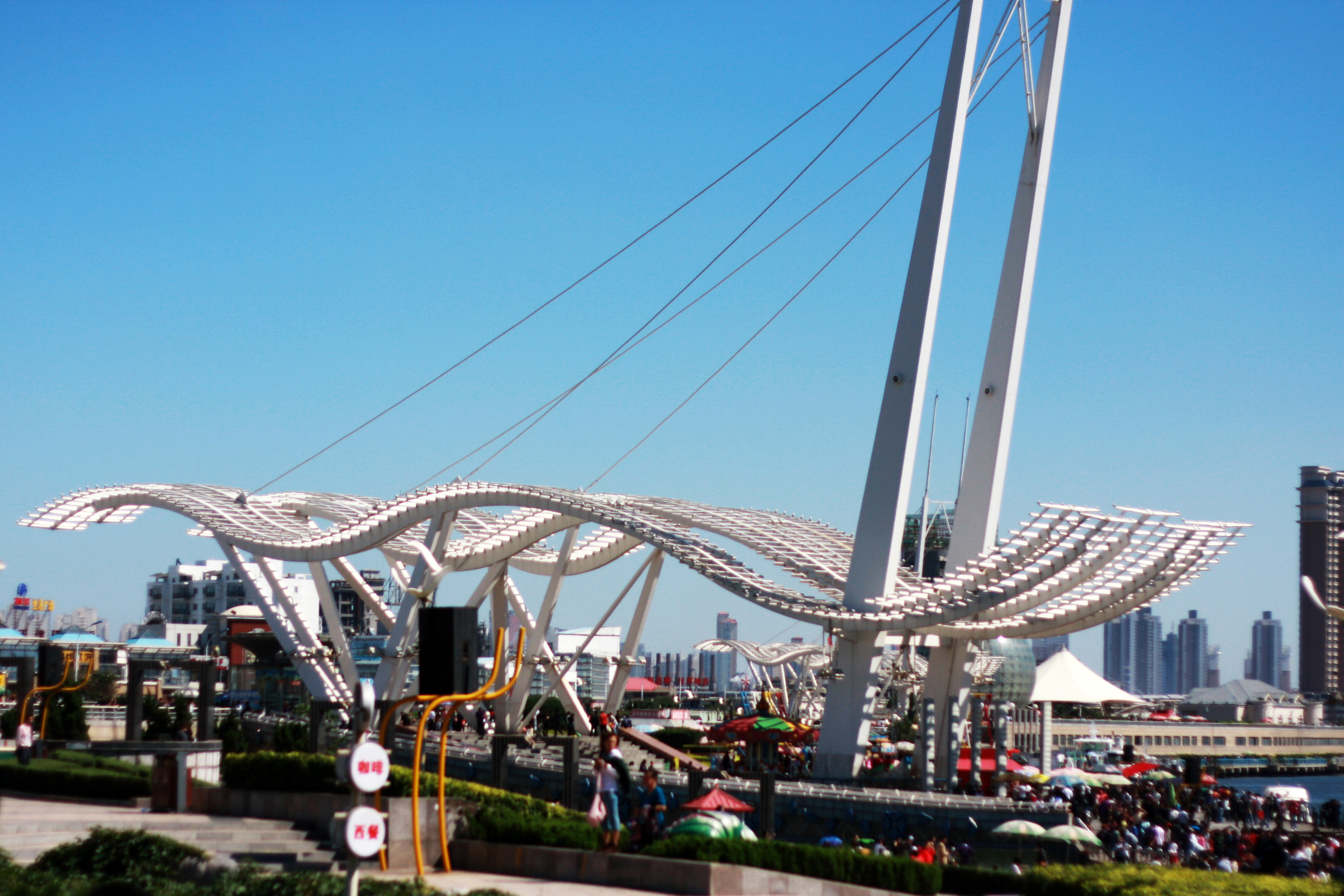 天津海河外滩公园碧帆海影